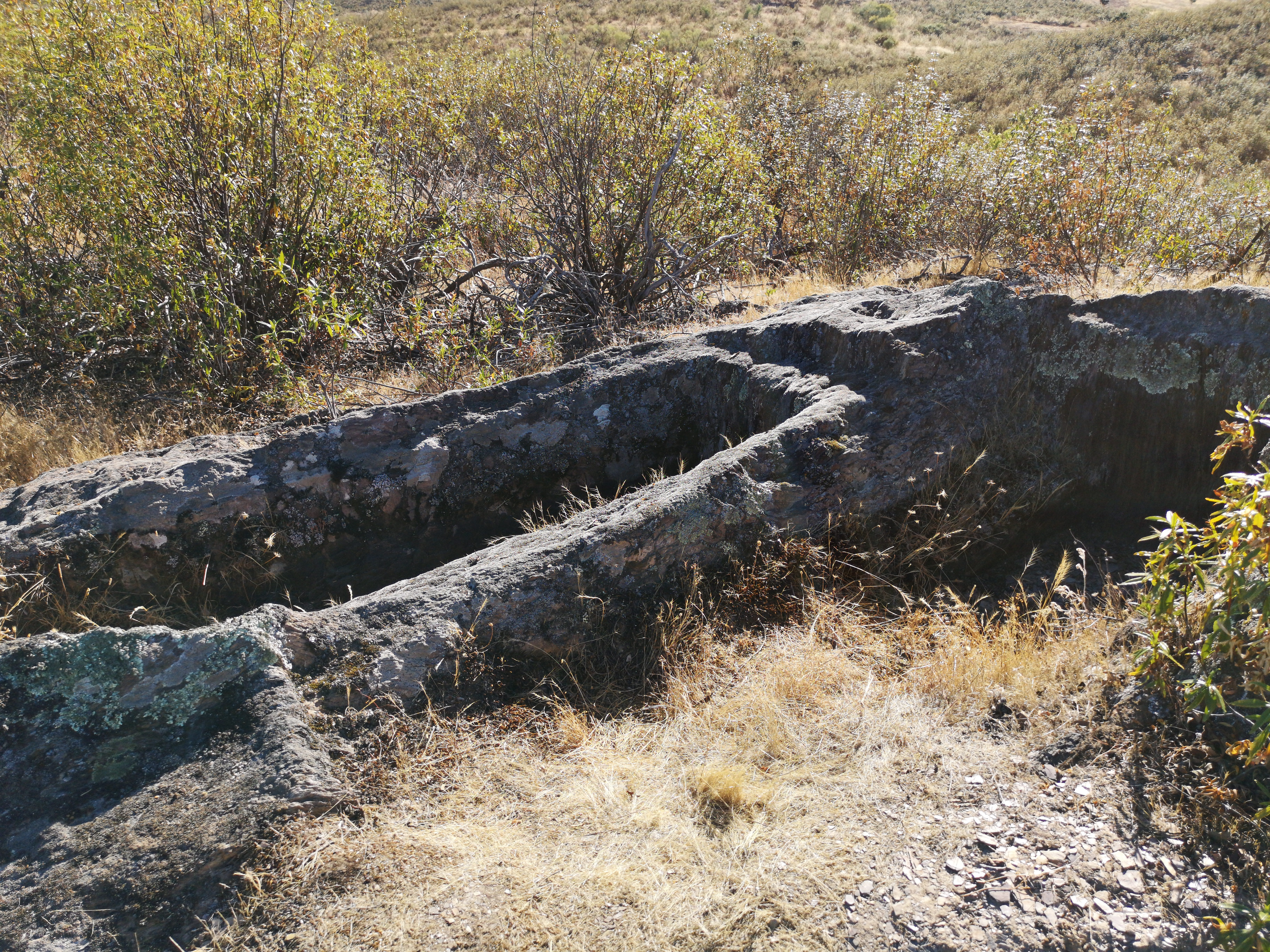 Tumbas de piedra en la contienda de Encinasola